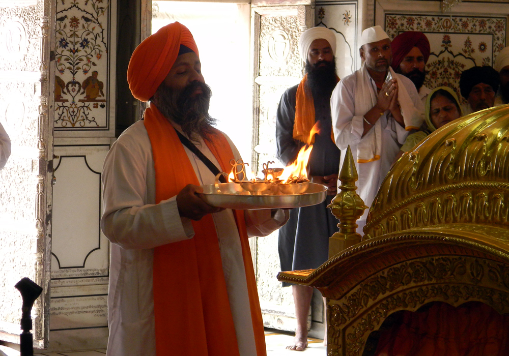 Sachkhand Shri Hazur Sahib Sikhs, India Aarti, puja